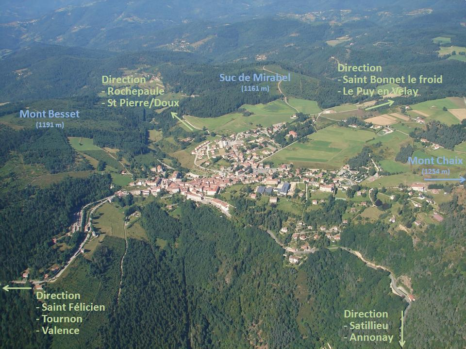 Vue aérienne commentée du village de Lalouvesc en ardèche